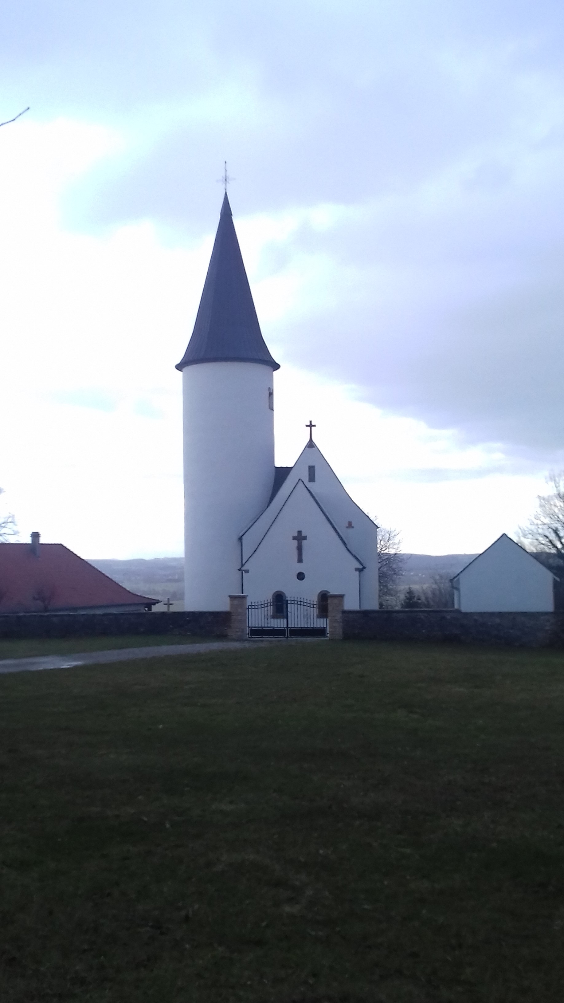 Eglise du Kirchberg